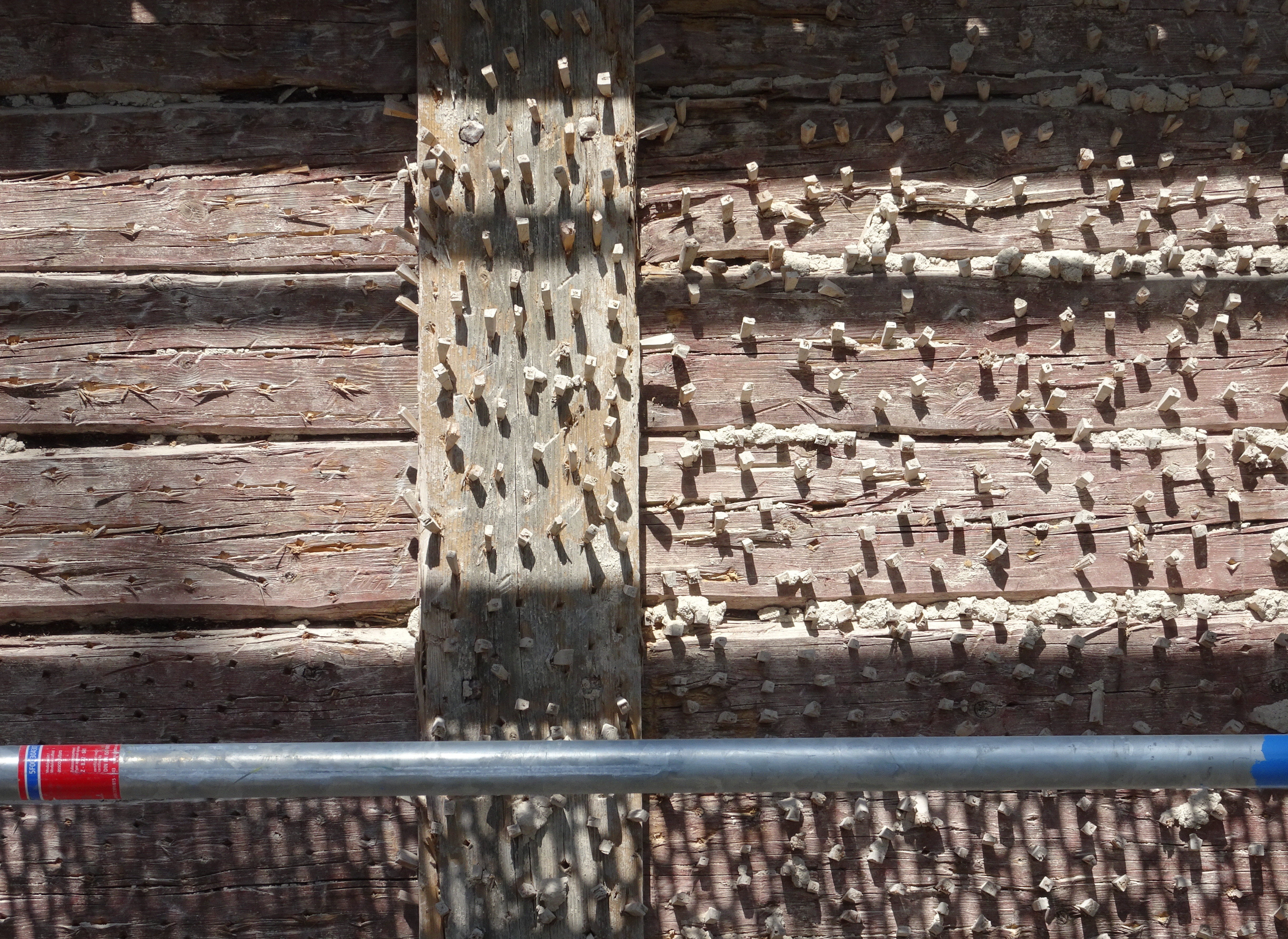 Östano slott, västra flygeln under renovering (fasaddetalj med putsfästen)